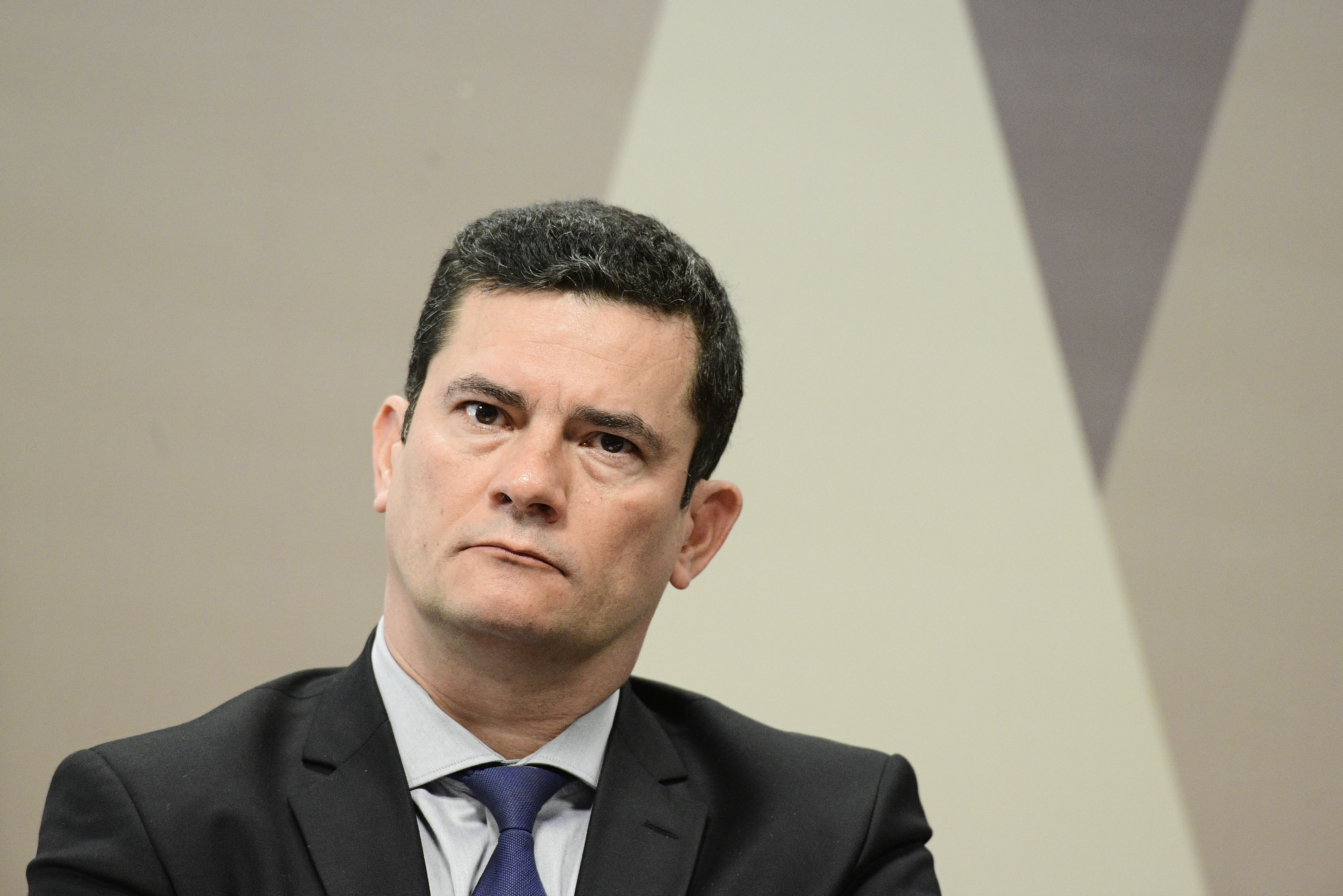 Comissão de Constituição, Justiça e Cidadania (CCJ) realiza audiência pública interativa para ouvir o ministro de Estado da Justiça e Segurança Pública, sobre informações e esclarecimentos a respeito das notícias veiculadas na imprensa relacionadas à Operação Lava Jato. À mesa, ministro de Estado da Justiça e Segurança Pública, Sergio Moro.